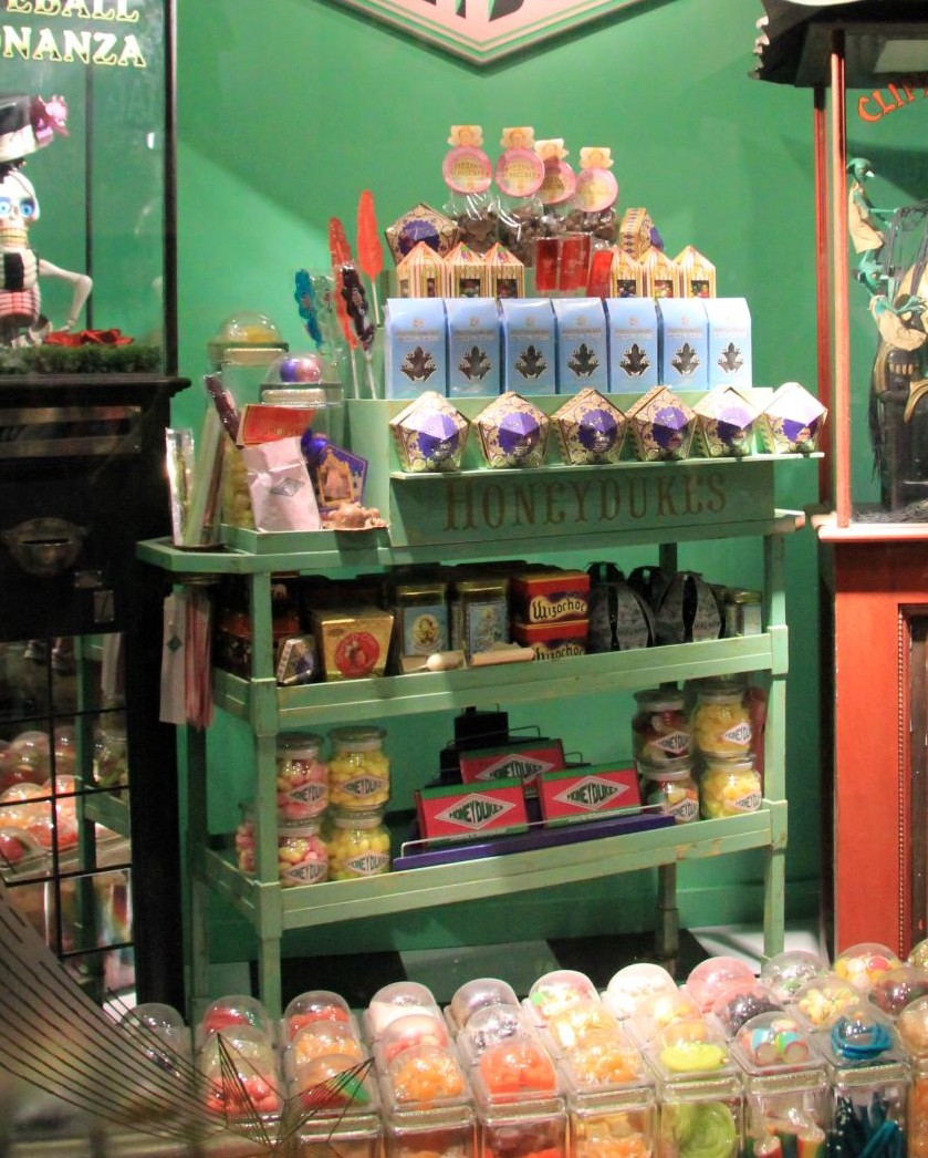 Friandises visibles aux studios Harry Potter (Studio Tour London) dans l'esprit de Honeydukes.